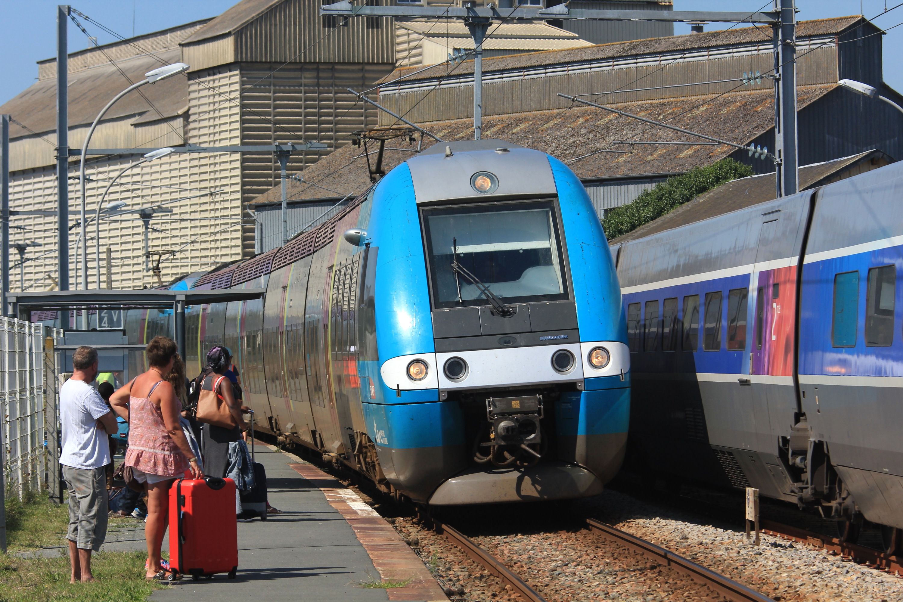 Deux Z 27500 (ZGC) assurant le TER 858898 (Les Sables-d'Olonne - Nantes) arrivent en gare de La Mothe-Achard et croisent le TGV 8971 (Paris - Les Sables-d'Olonne) en retard de 25 minutes et stationnant sur la voie d'évitement depuis un peu plus de 5 minutes.